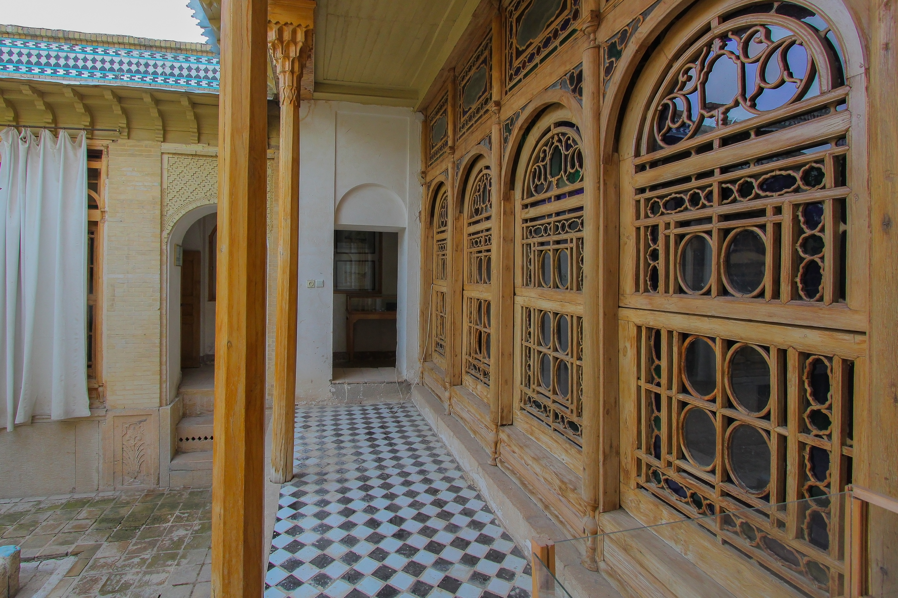 منزل فروغ الملک قوامی